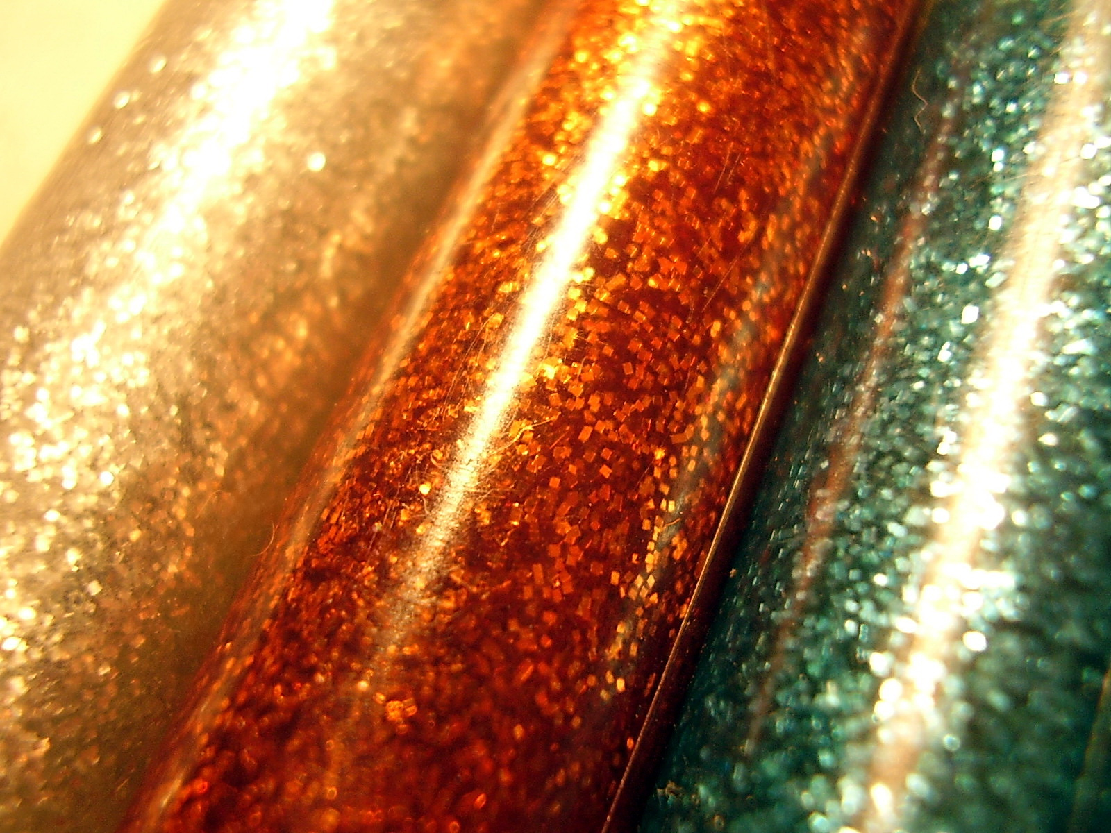 Brokat